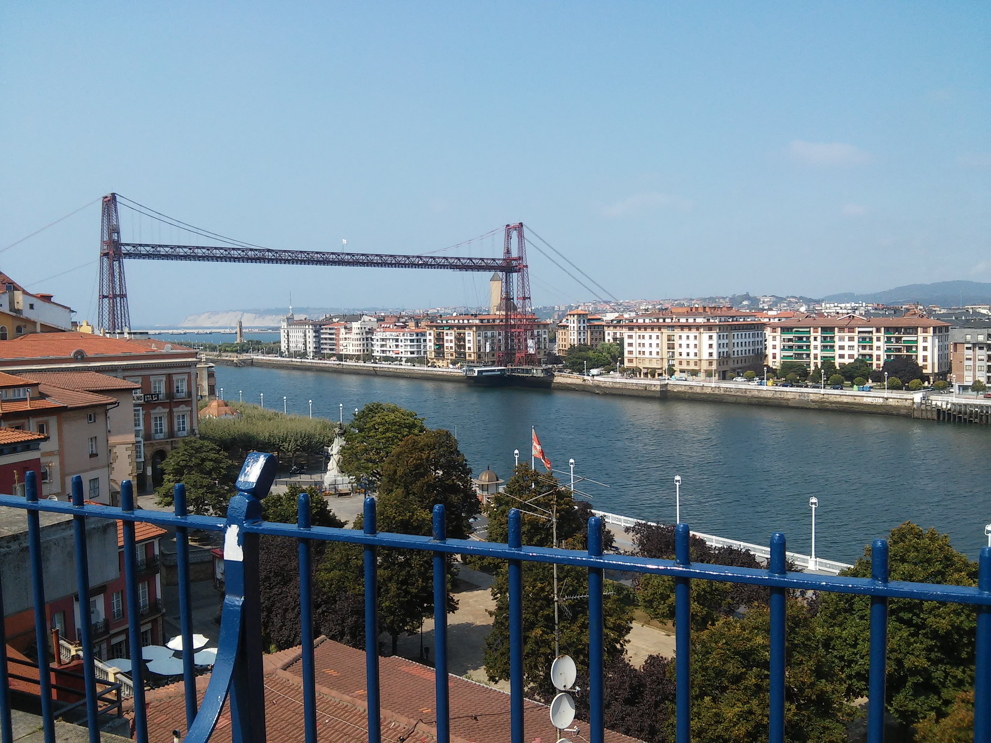 Vista del Rio Nervión, de Getxo y del Puente de Vizcaya (Bizkaiko Zubia) desde Portugalete.